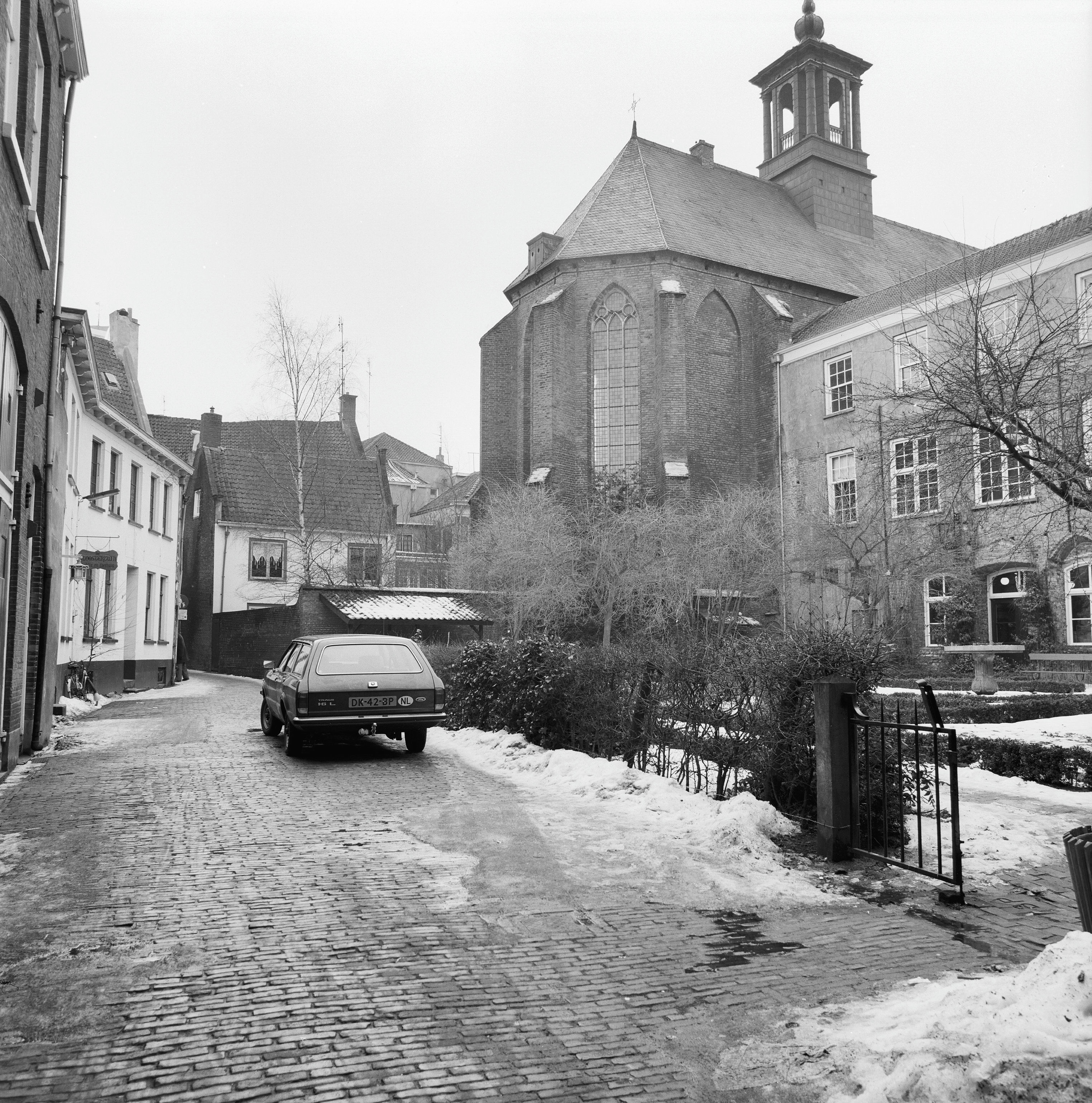 Broederenkerk/ Kloostergebouwen, thans onder meer Stedelijk Museum: De Rosmolensteeg te Zutphen in de winter met rechts de Broederenkerk en het Stedelijk Museum